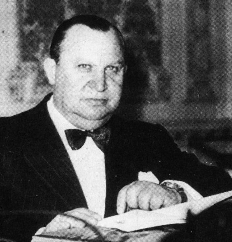 El productor de radio y televisión búlgaro-argentino Jaime Yankelevich